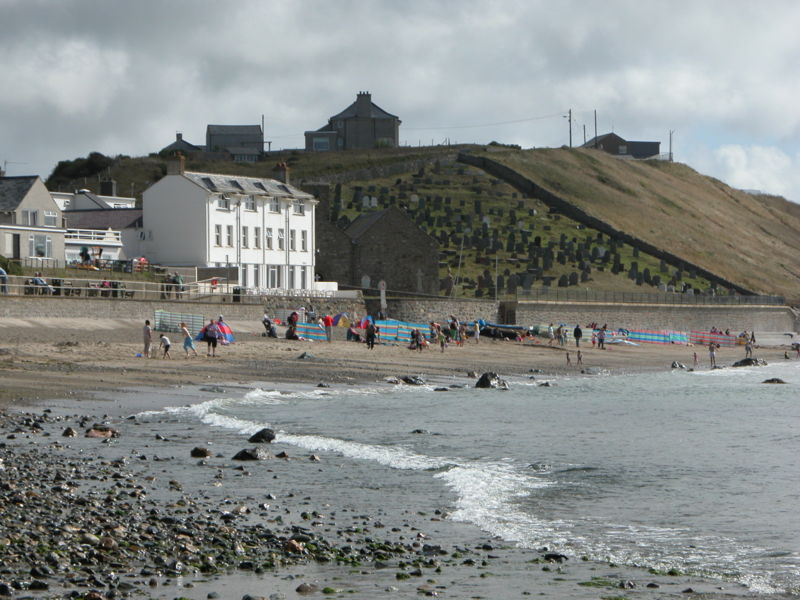 Aberdaeron general view. By William M. Connolley, 2006/08.